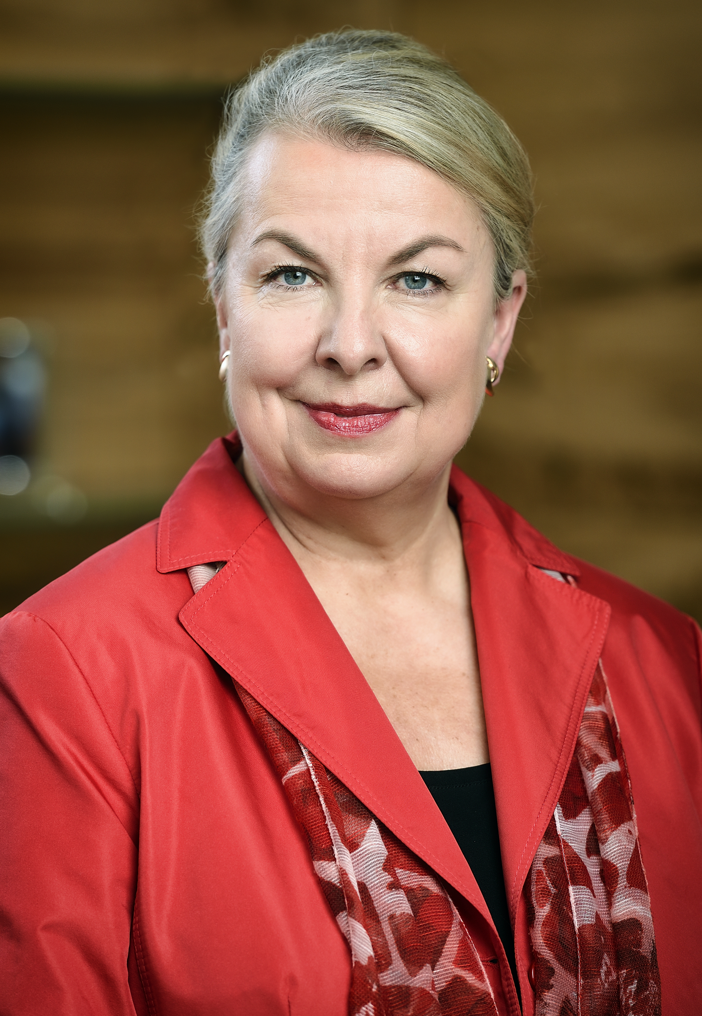 Portrait-Foto Mag. Beate Hartinger-Klein